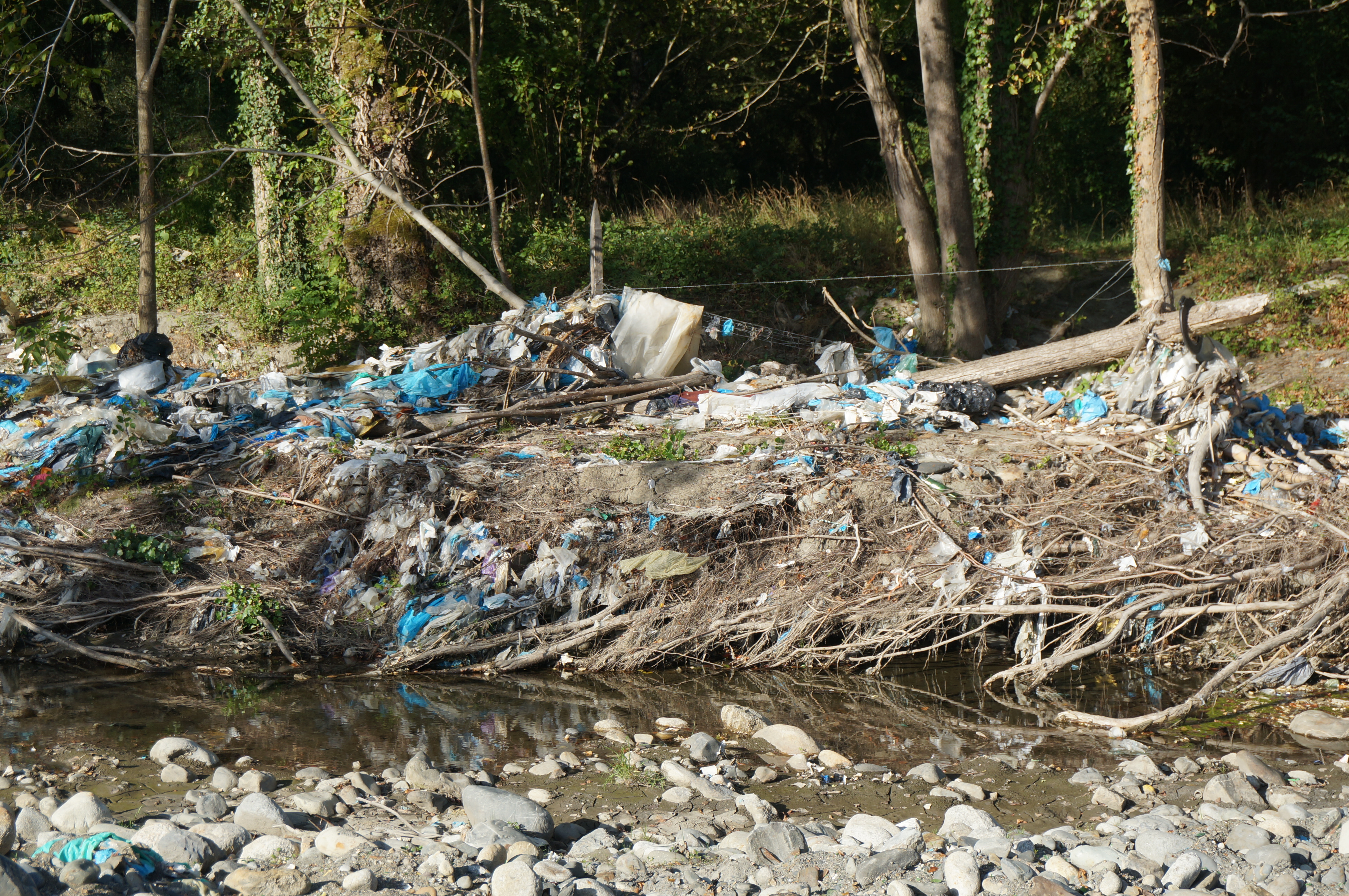 Présence de déchets sur un lieu visité par le programme Riverine Input